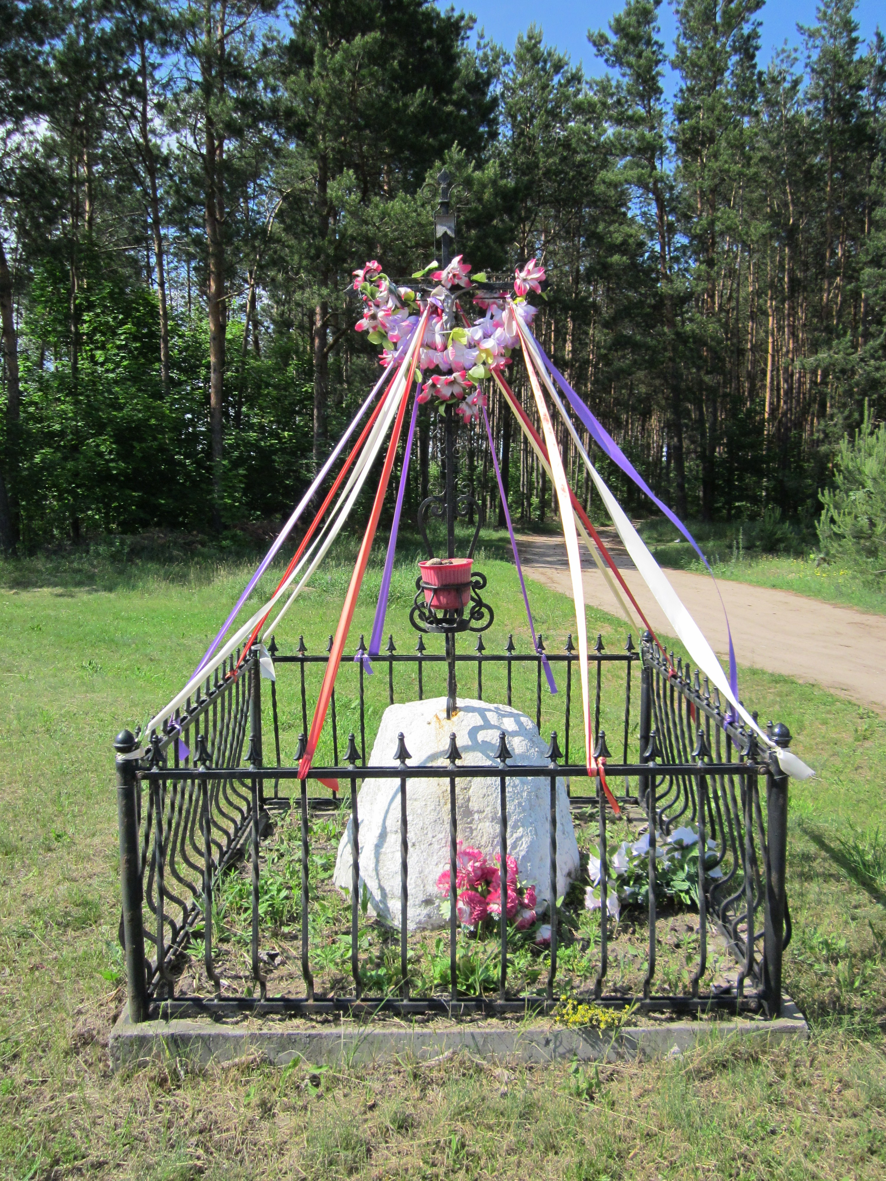 Krzyż przydrożny (m. Czechowizna - Dk 65)